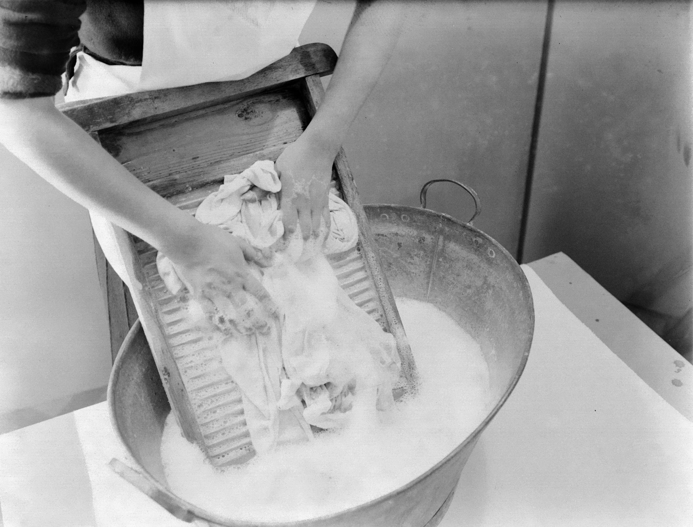 Collectie / Archief : Fotocollectie Van de Poll Reportage / Serie : Reclamefotografie Beschrijving : Handen van een vrouw bezig met wassen met een wasbord Annotatie : Mogelijk deel van serie "Handen I", 1932-922/930, kan ook zijn 1932-939 Datum : 1 januari 1932 Trefwoorden : handen, huishouding, wasgoed, zeep Fotograaf : Poll, Willem van de Auteursrechthebbende : Nationaal Archief Materiaalsoort : Glasnegatief Nummer archiefinventaris : bekijk toegang 2.24.14.02 Bestanddeelnummer : 252-0506